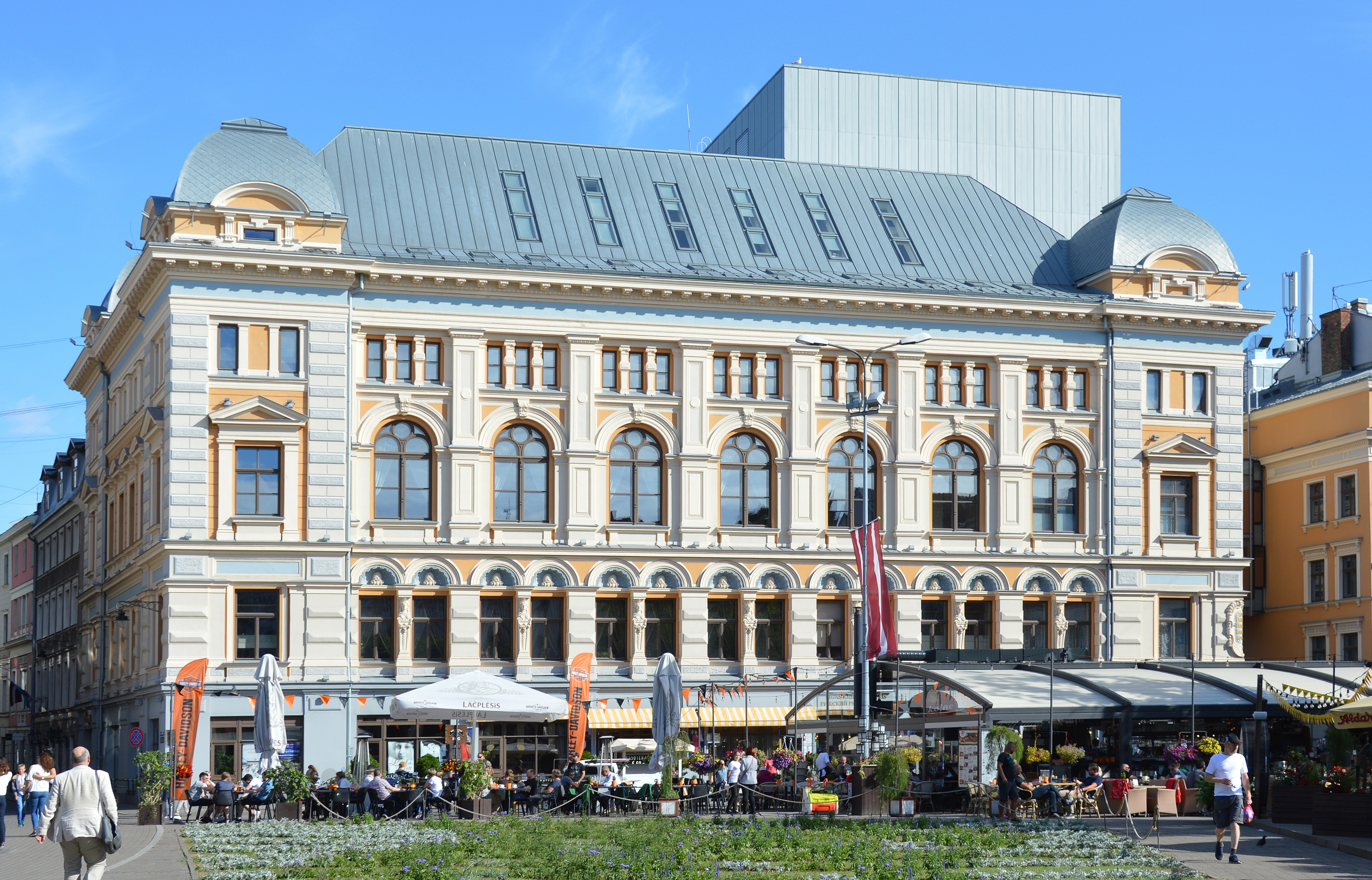 Russisches Theater in Riga, Kalkstraße 16